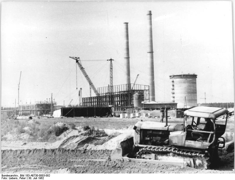 Zentralbild-Liebers 30.7.1962 Erdölverarbeitungswerk Schwedt. Große Anstrengungen werden gegenwärtig im Erdölverarbeitungswerk Schwedt unternommen, um die durch Arbeitskräftemangel und andere Schwierigkeiten entstandenen Planrückstände aufzuholen und die festgelegten Zwischentermine zu erfüllen. Schwerpunkte sind dabei das 75 Megawatt-Kraftwerk, die Rohöldestillation und der Bau von Trassen und Rohrleitungen. UBz.: Blick auf das 75 Megawatt-Kraftwerk. Im Vordergrund bereitet eine Planierraupe die Trasse für eine neue Rohrleitung vor.